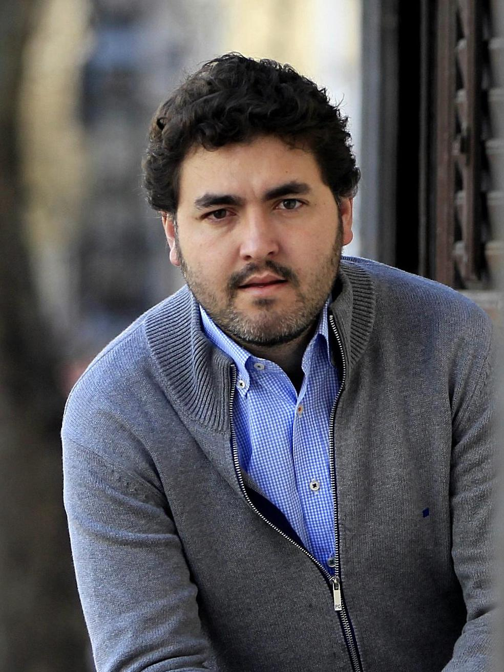 El europarlamentario socialista Jonás Fernández advierte de que el contrato único como el que defiende Ciudadanos "convertiría en temporales a los indefinidos". Matiza que "una cosa es rescatar a los bancos y otra a los banqueros" y asegura que "Alemania ya no tiene tanto poder. Deberíamos saber que lleva dos años perdiendo votaciones en el Banco Central Europeo". "La política económica de la Comisión en estos seis meses es claramente socialdemócrata y no me cuesta nada decirlo"